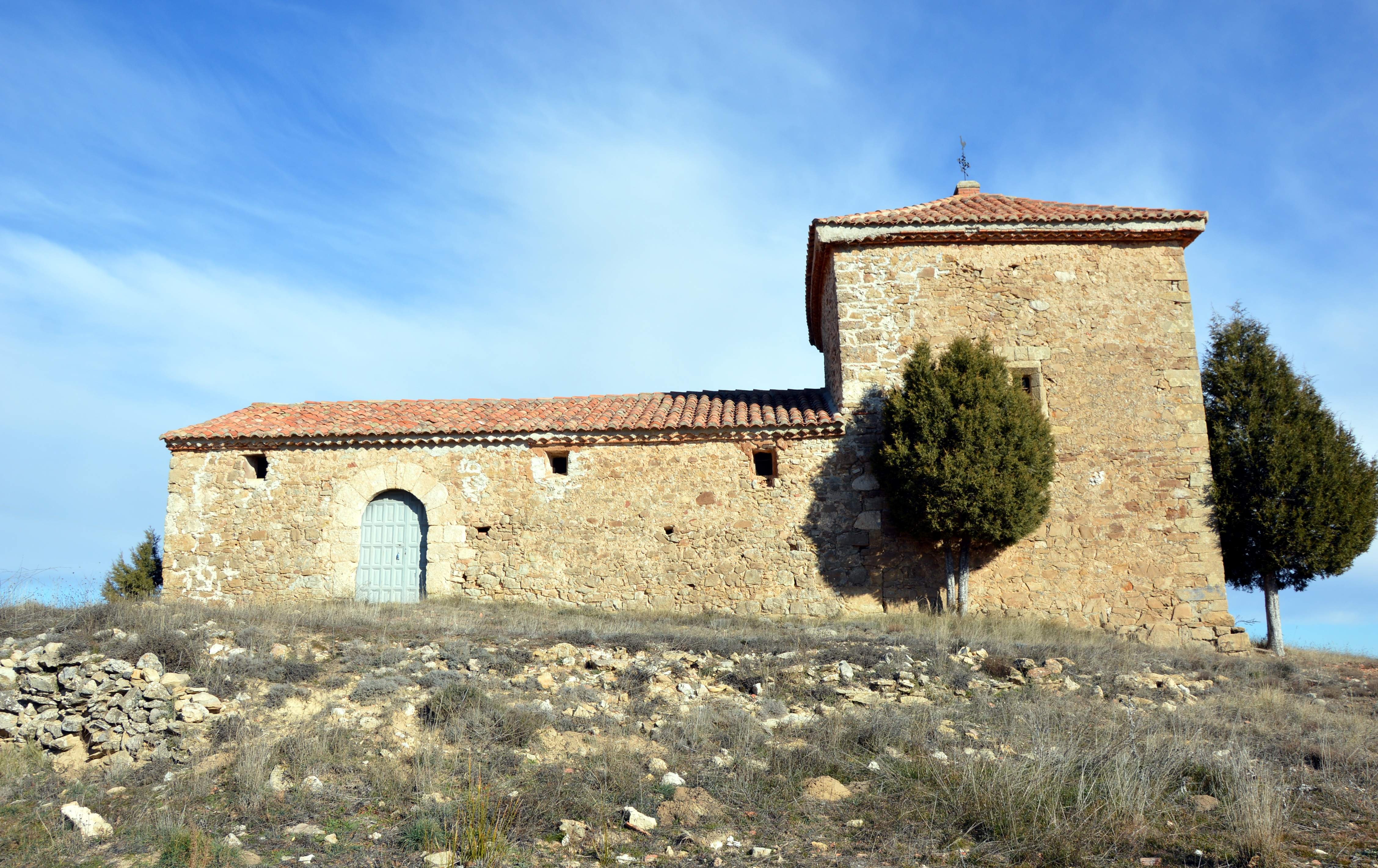 Vista general (mreidional) de la ermita de San Marcos, antigua ermita de la Sma. Trinidad en Veguillas de la Sierra (Teruel), siglo XVII.